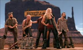 Rednex under en videoinspelning av The Way I Mate i Bryssel 1999 Billy Ray, BB Stiff, KenTacky, Whippy och Bobby Sue